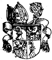 Wappen des Basler Bischofs Lüthold II. (Lüthold I. von Rötteln)